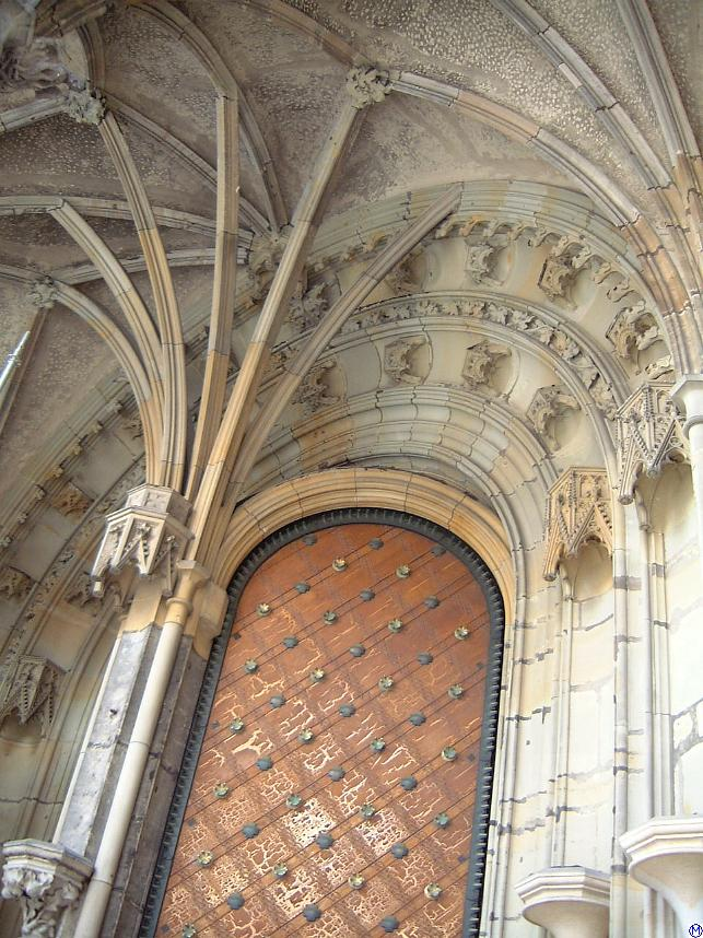 Goldene Pforte Prag St.Veit